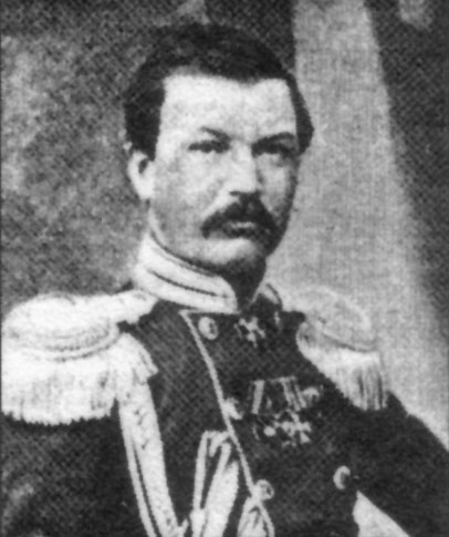 Admiral Shestakov